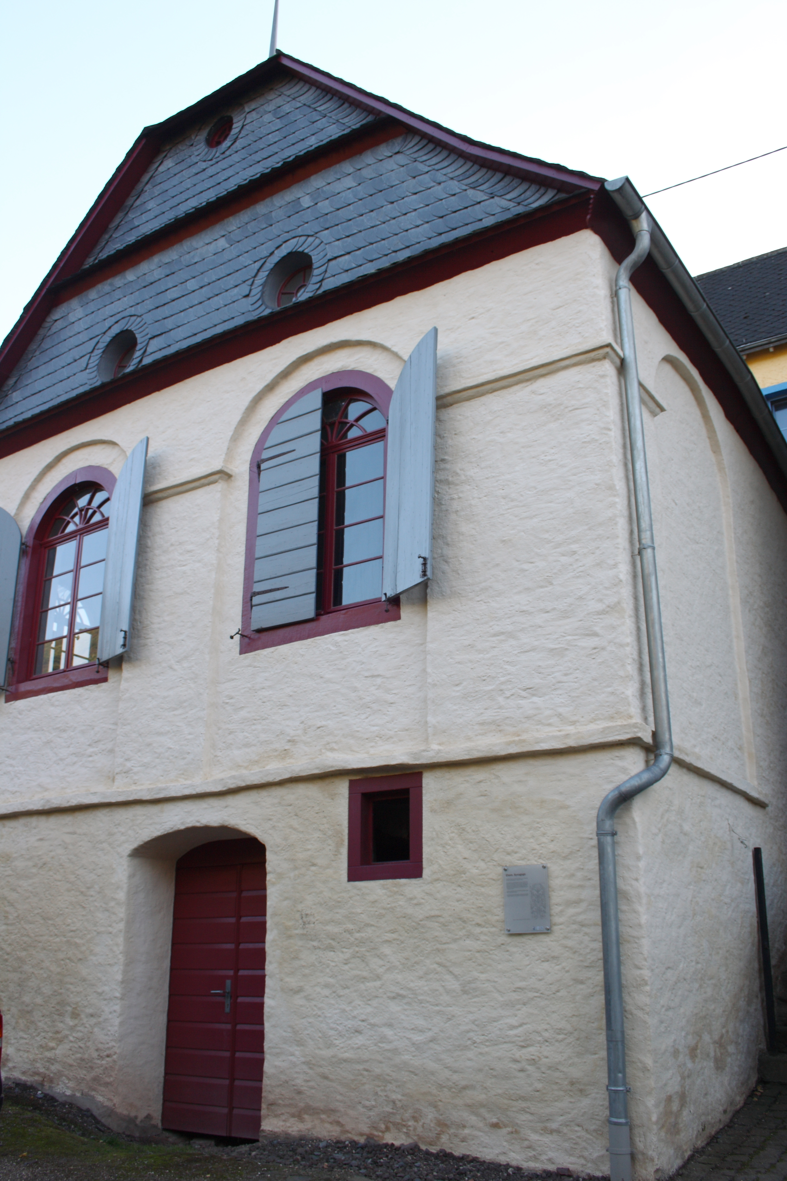 ehemalige Synagoge in Bruttig (neben Mühlenbachstraße 10), einem Ortsteil von Bruttig-Fankel im Landkreis Cochem-Zell (Rheinland-Pfalz)